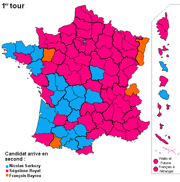 Carte des candidats arrivés en seconde position dans les départements au terme du second tour de l'élection présidentielle française de 2007.